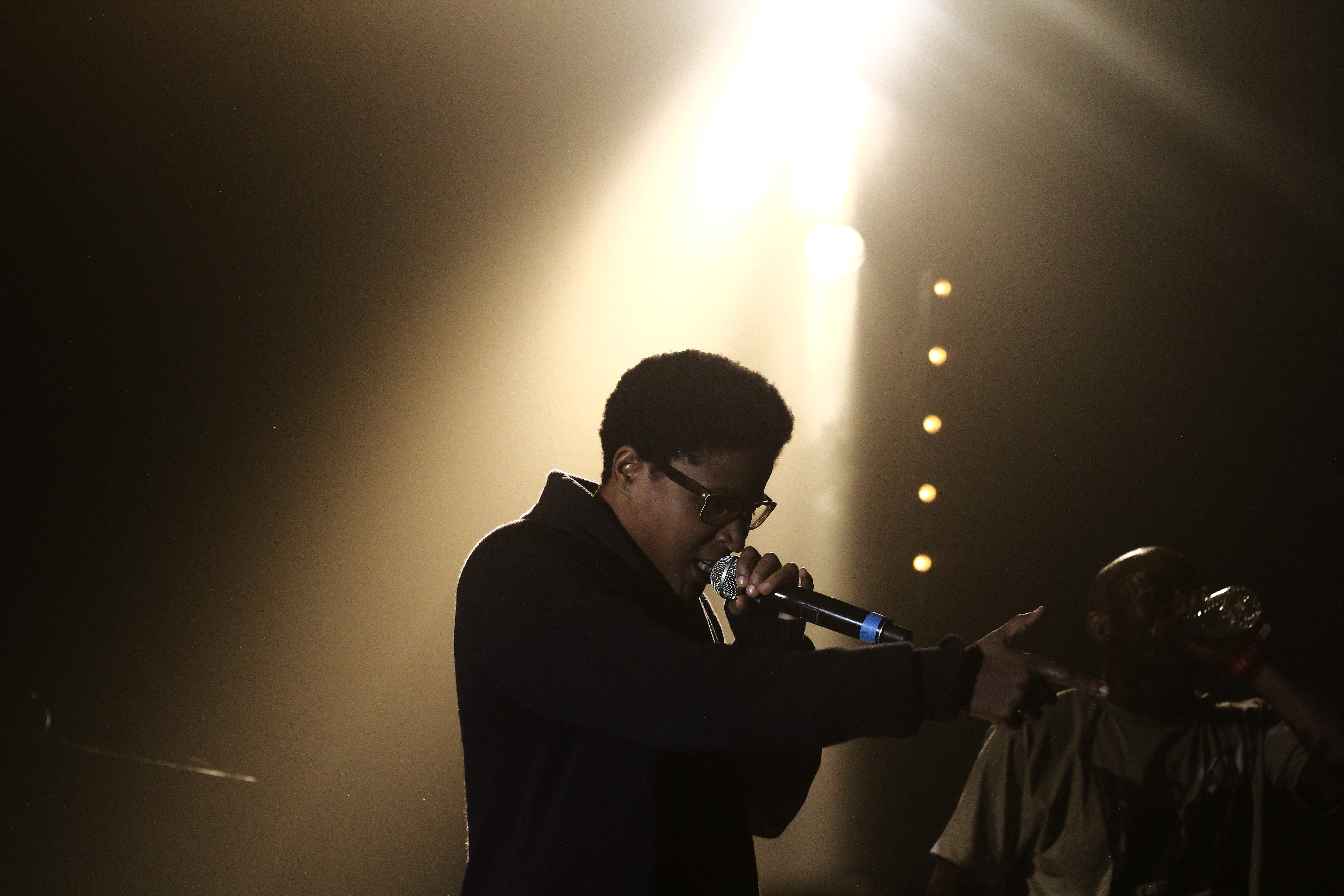 Casey, avec l'Asocial Club, au Festival Terre(s) Hip Hop 2014